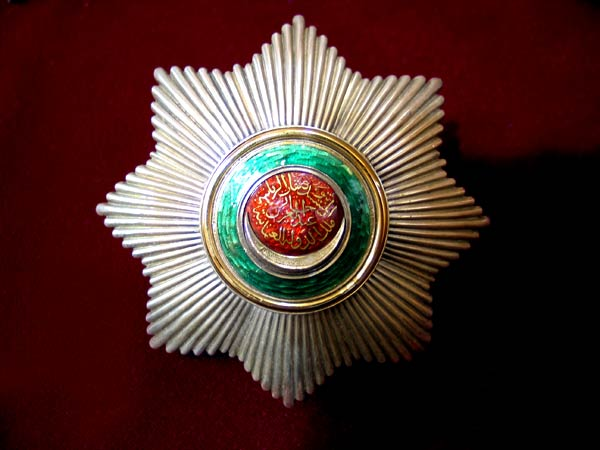 Osmanje-Orden - Kreuz erste Klasse